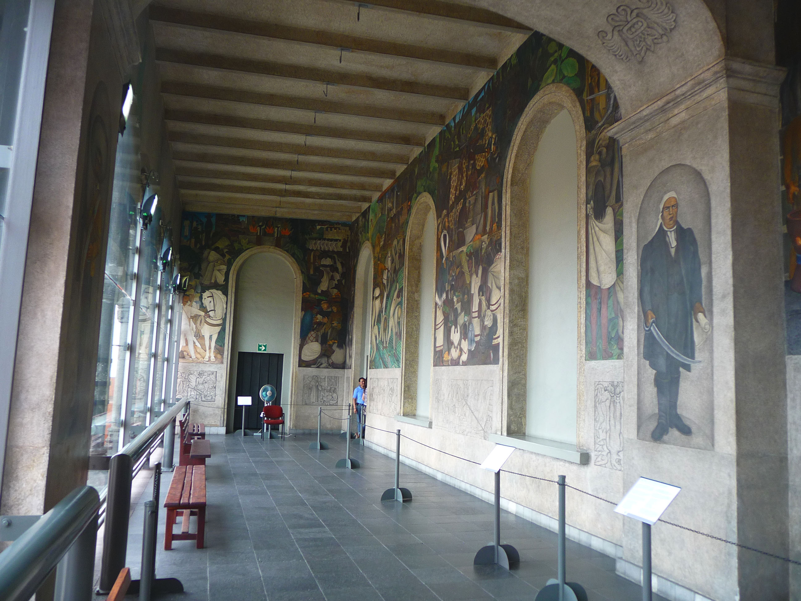 Mural Diego Rivera, Palacio de Hernán Cortés